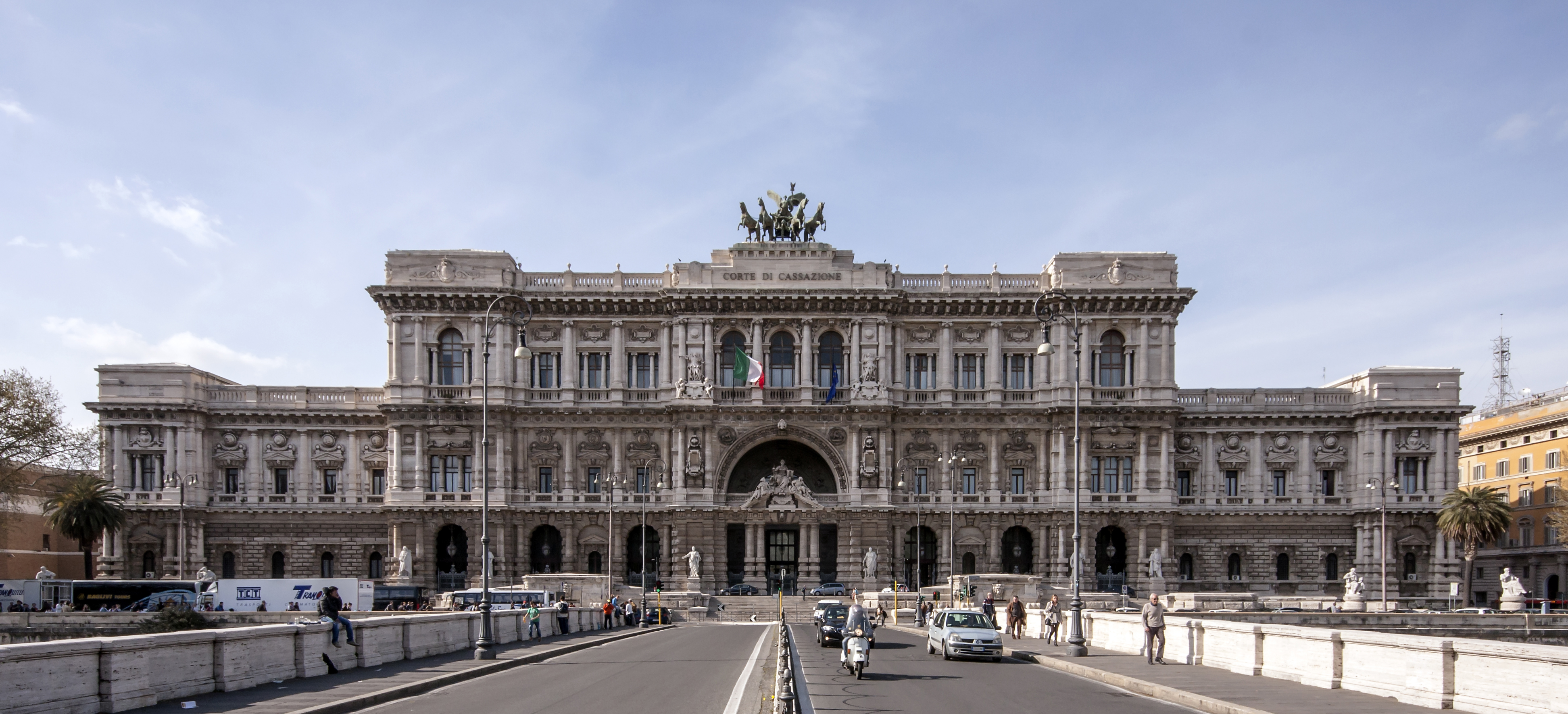 Justitiepalatset i Rom.